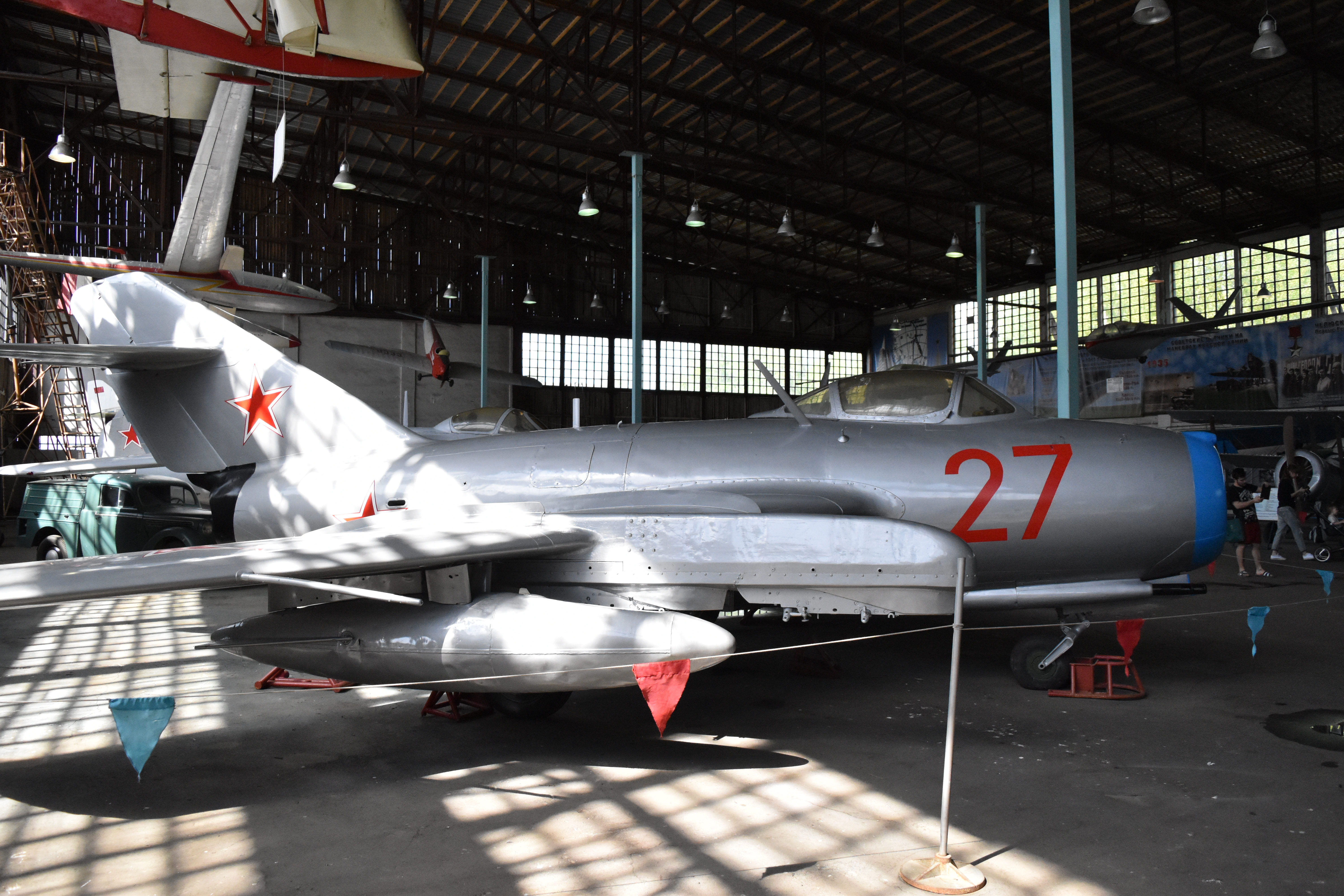 Фронтови изтребител МиГ-15бис, Централен музей на военновъздушните сили, Монино, Русия.